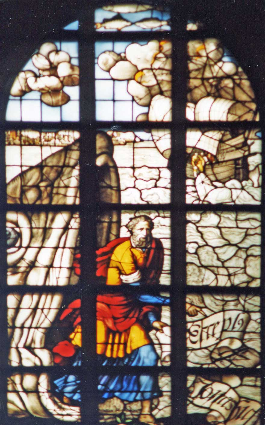 Detail glas 30 St. Janskerk te Gouda: Jona en de walvis; maker Dirk Crabeth voor 1565